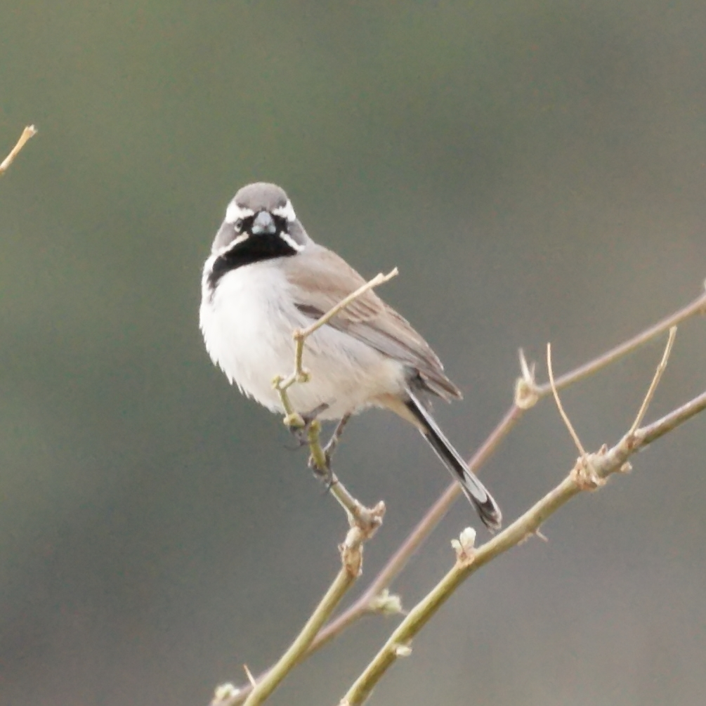 Amphispiza bilineata, Tucson, Arizona